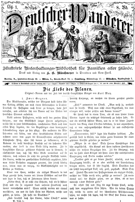 Erste Seite des Fortsetzungsromans Die Liebe des Ulanen von Karl May, erschienen in der Zeitschrift Deutscher Wanderer im Verlag H. G. Münchmeyer